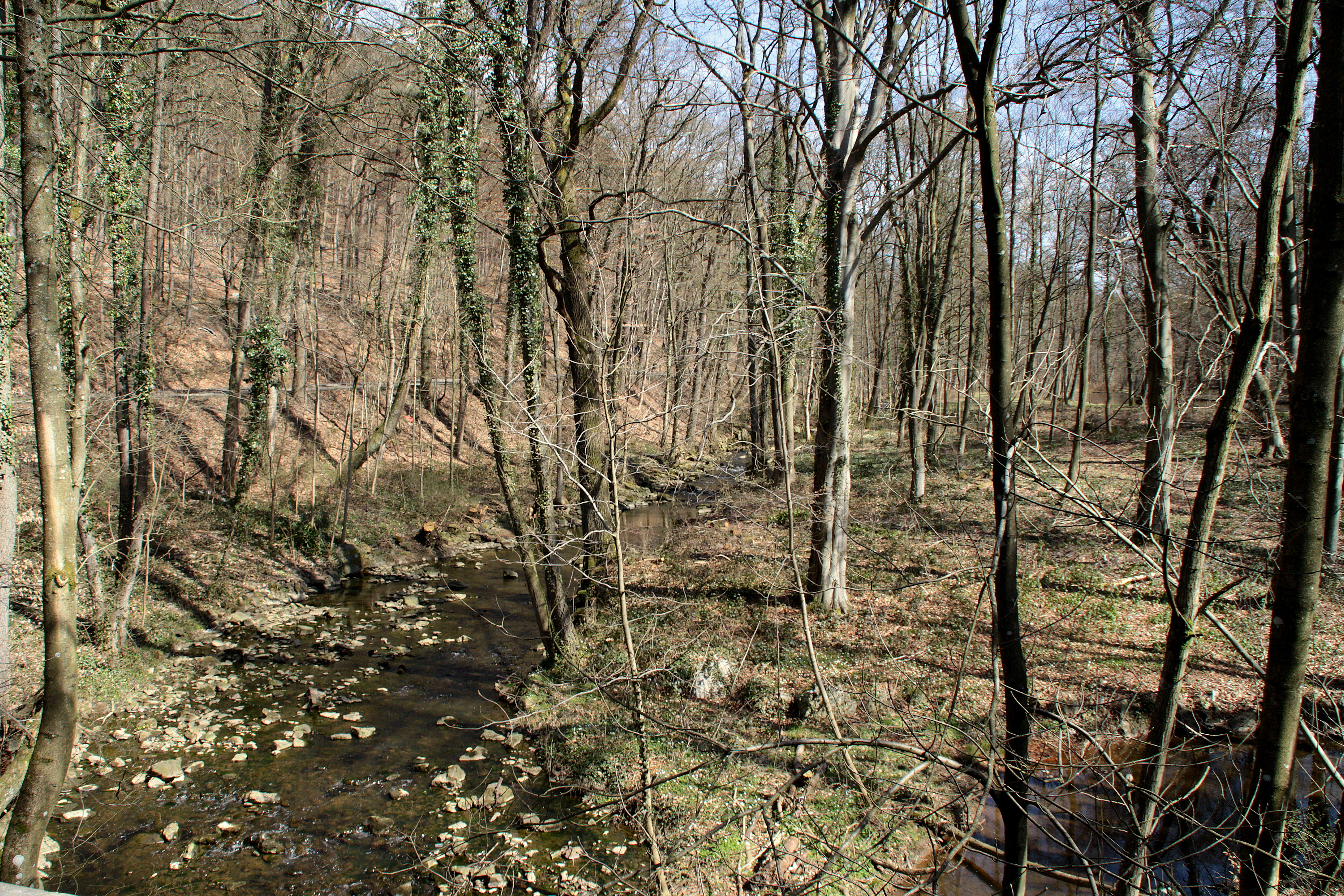 De Waya bei der Schwämm zu Spa